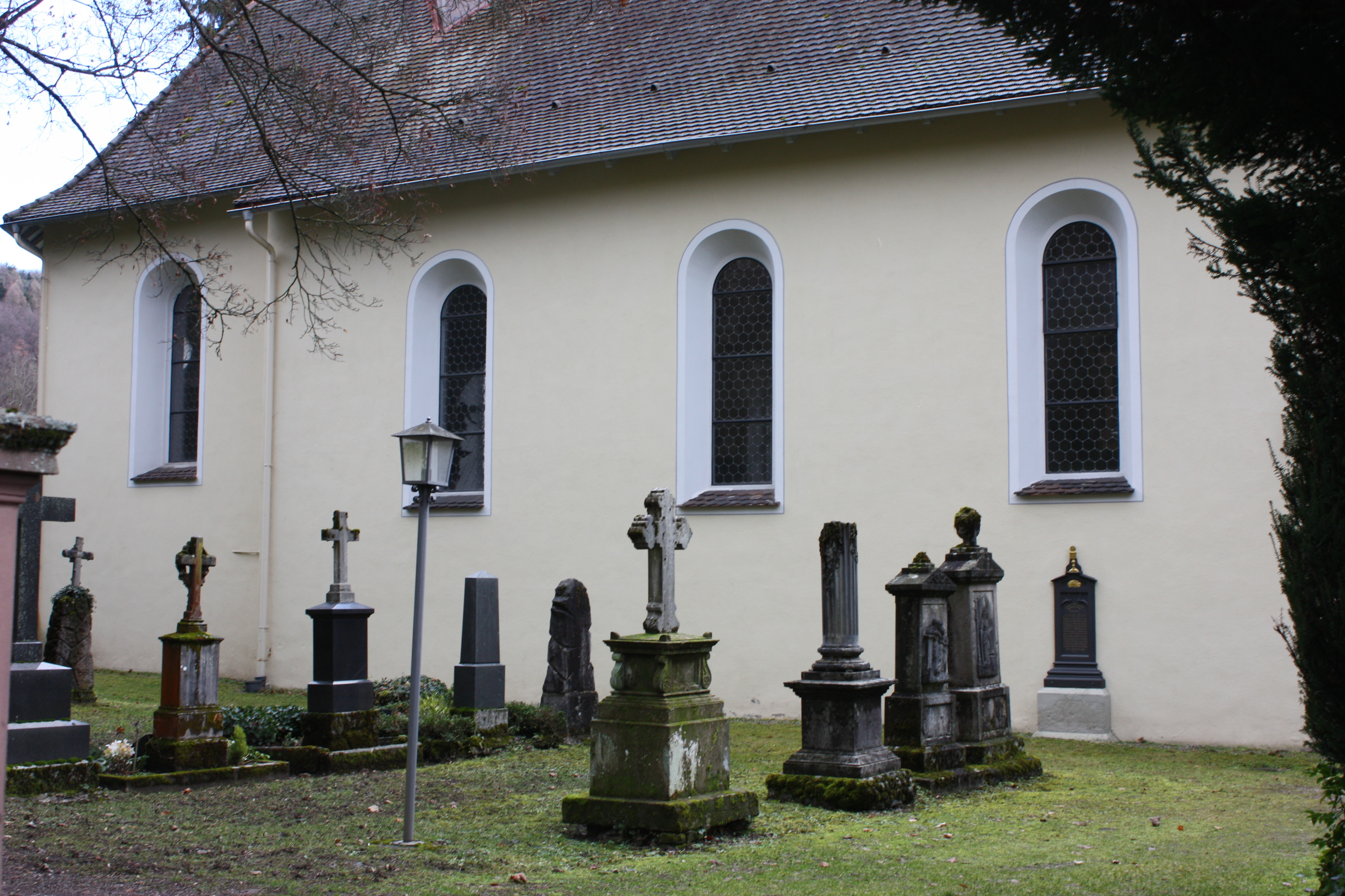 Der Ort der letzten Ruhestätte der Väter Kapuziner in Waldshut vor der Nordwand der Gottesackerkapelle in der Gräberreihe links.